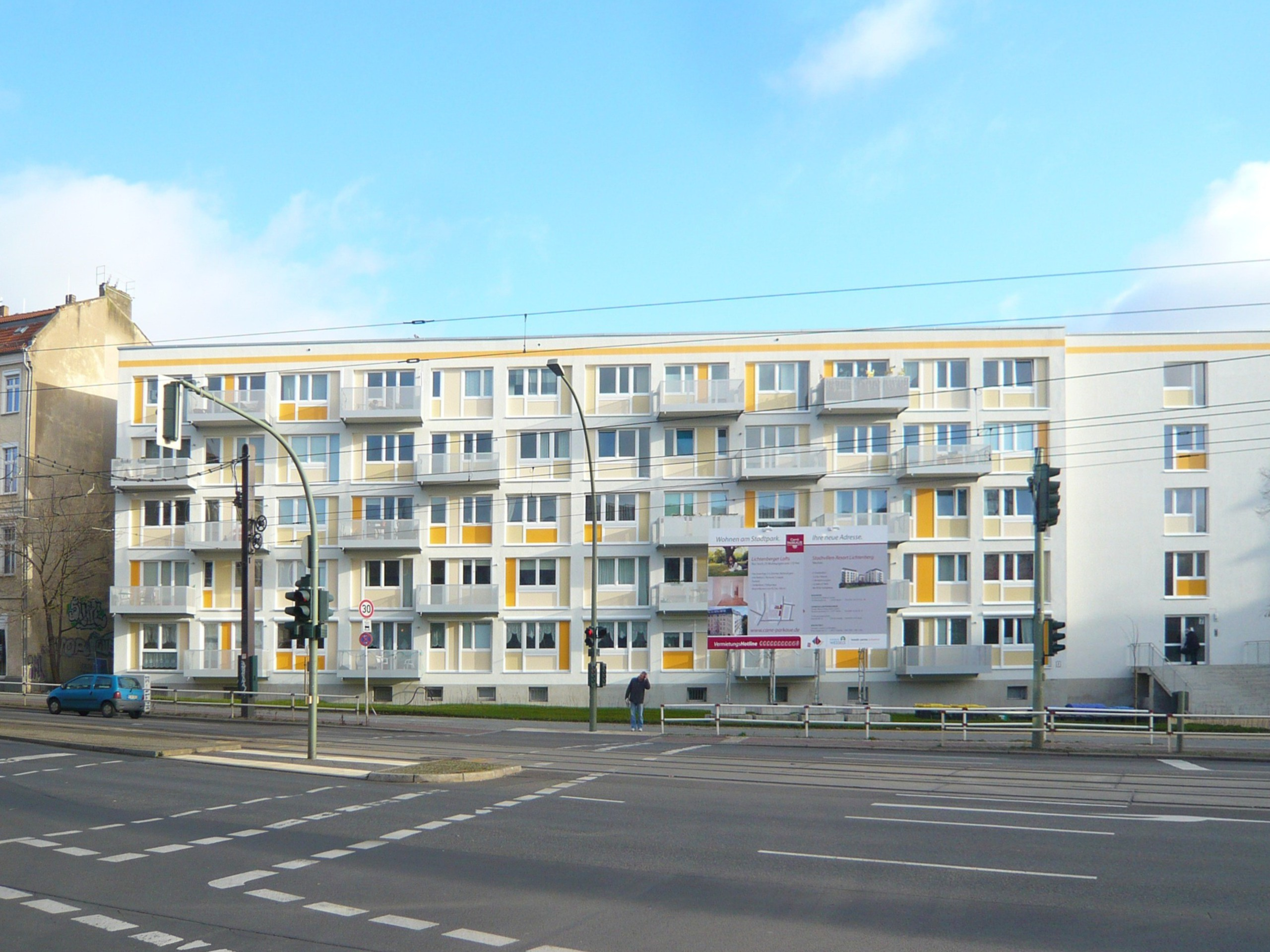 Bezirk Lichtenberg, Möllendorffstraße, Appartementhaus